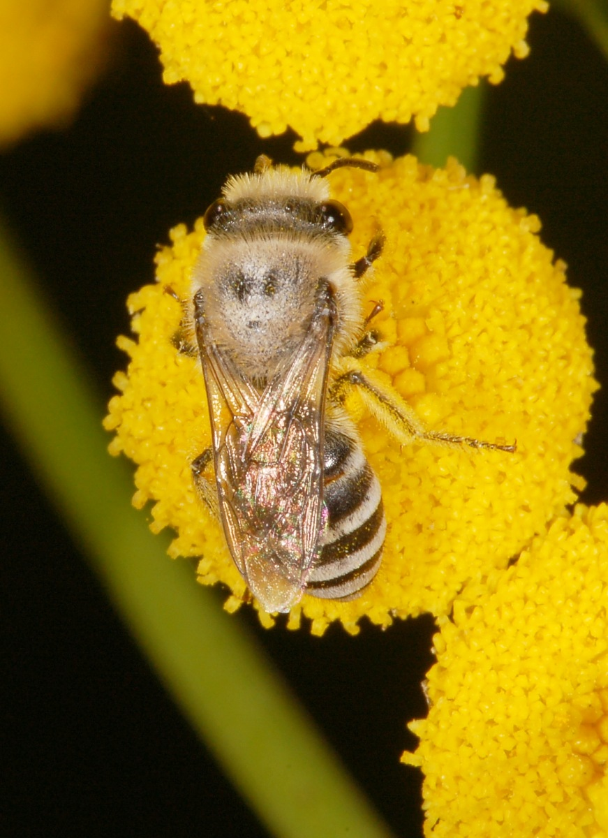 Colletes daviesanus, Trebur am Rhein, Hessen, Deutschland